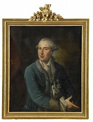 Porträtt av överståthållaren friherre Carl Sparre (1723-1791) iklädd pälsfodrad blå rock med svärdsorden - stående midjebild. Jämför snarlikt porträtt på Trolle-Ljungby, Skåne, utfört av Christopher Hieronymus Johansen sannolikt efter tysken Daniel Woges förlaga, SPA 1924:1589